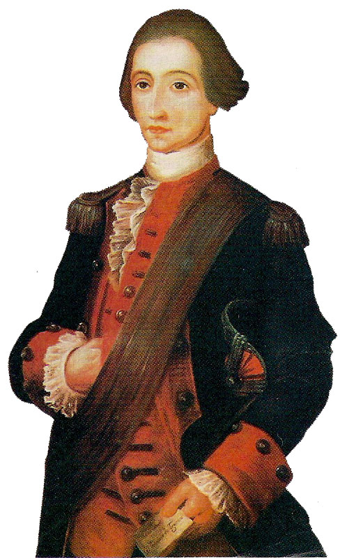 Tomás de Figueroa y Caravaca (1747-1811) fue un militar español que en Chile llevó a cabo un infructuoso cuartelazo, conocido como Motín de Figueroa que tenía como objetivo suspender las labores de la en la Primera Junta Nacional de Gobierno y restablecer el orden colonial.